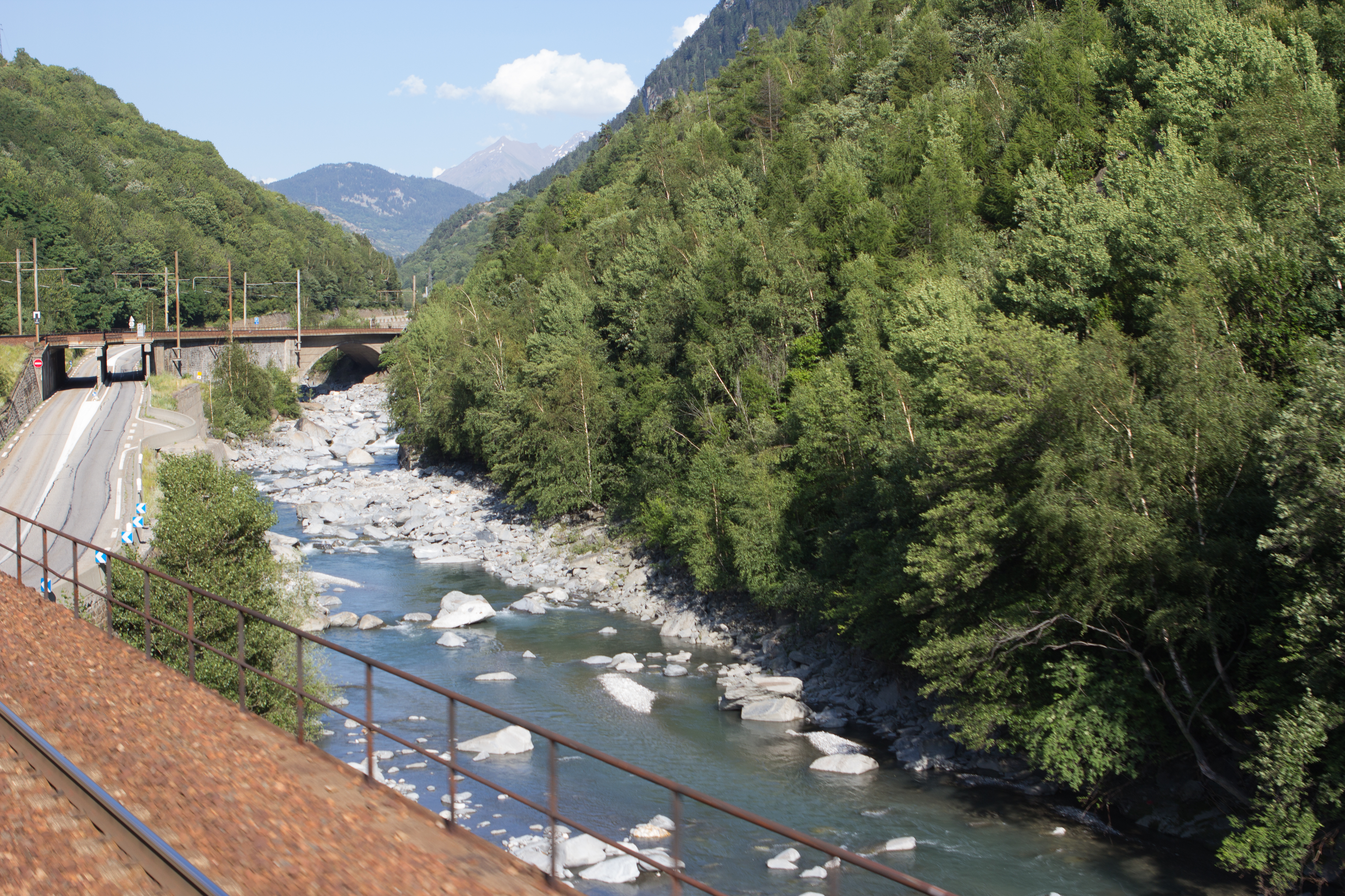 La ligne de la Maurienne, début de la déviation Anvers, pont sur l'Arc (PK 225,398), en direction de Modane / commune d'Orelle, Savoie, France